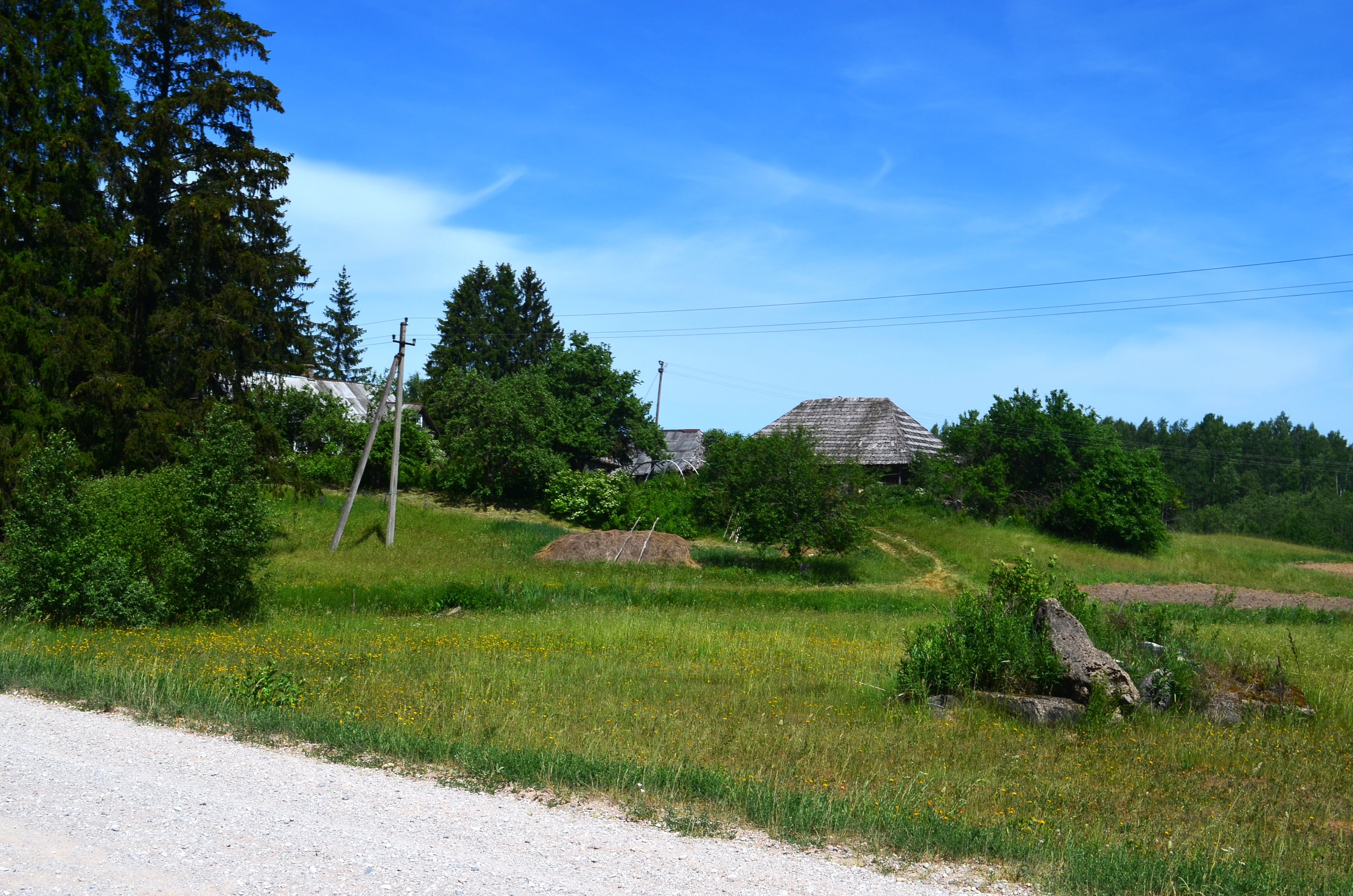 Ratališkės, Vilniaus r.